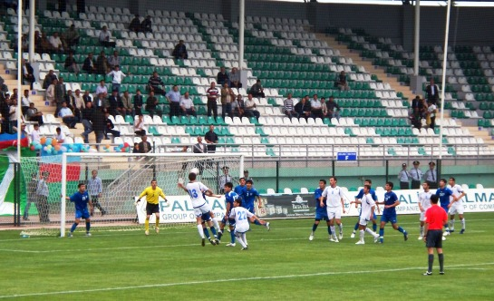 эпизод матча Азербайджан (У-21) - Узбекистан (У-20)